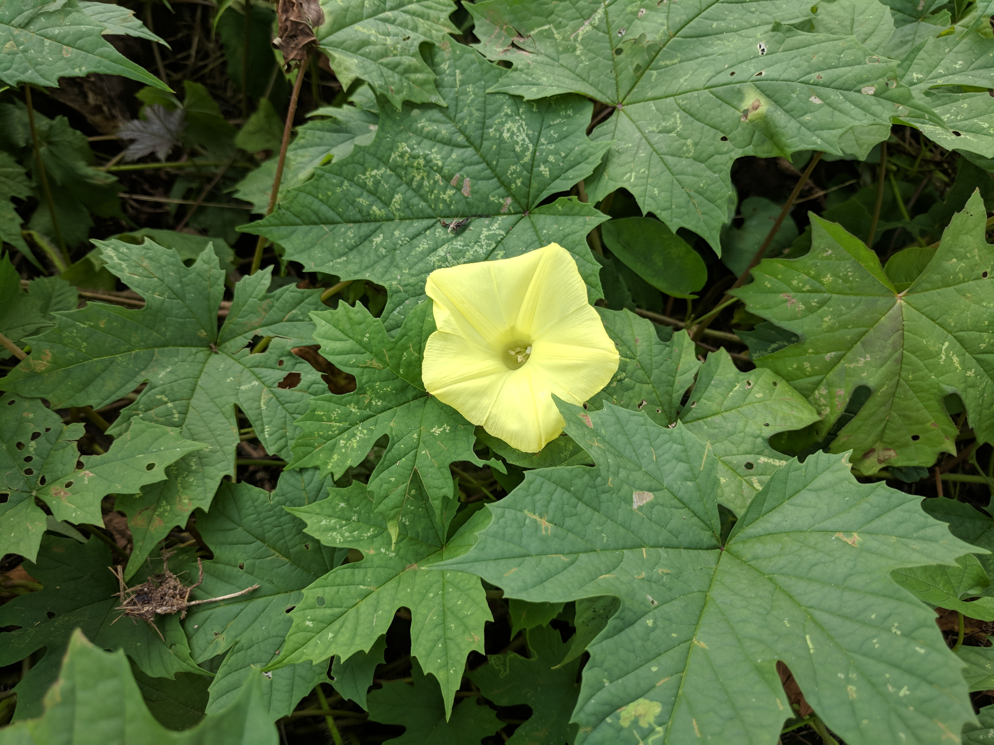 Merremia vitifolia , Kerala, India}